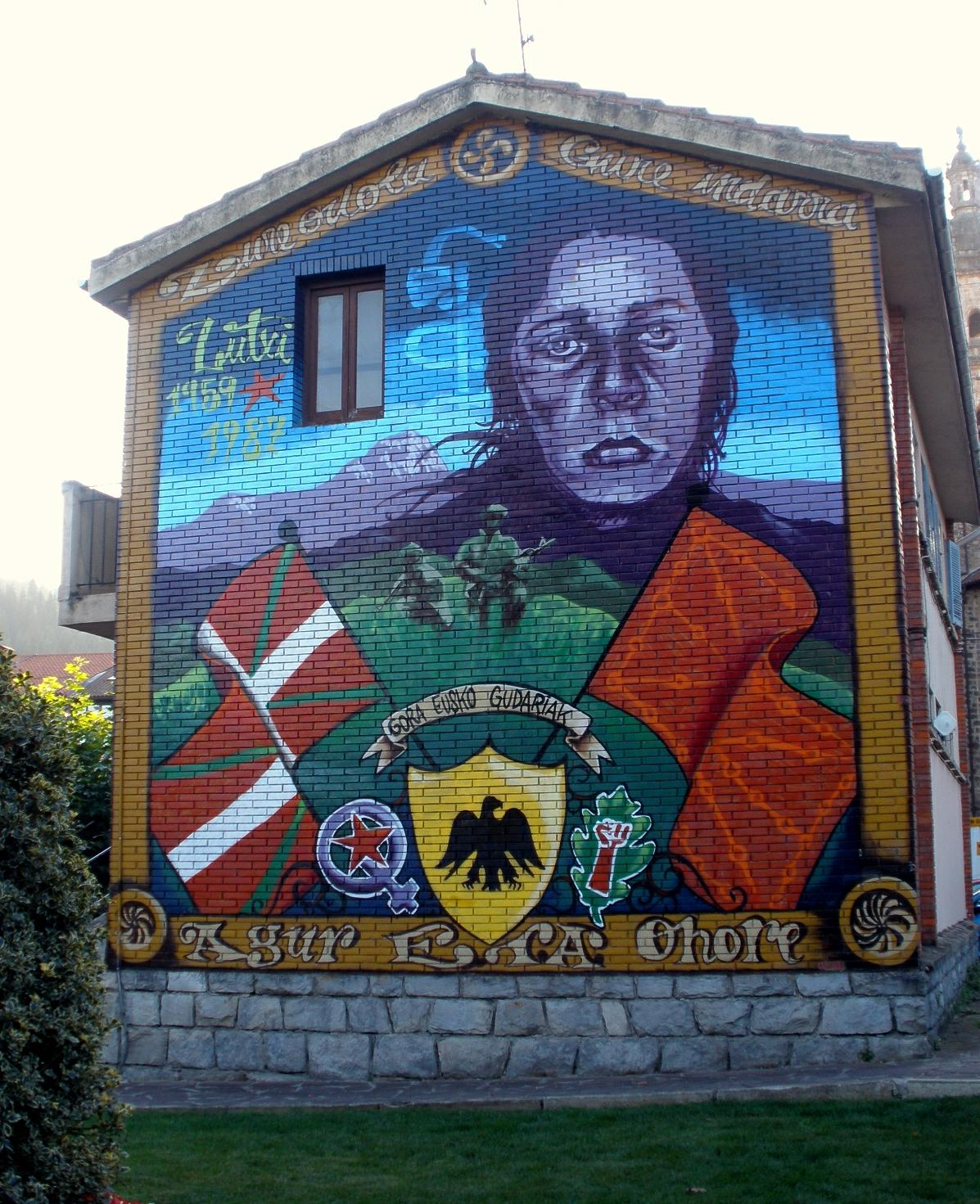 Glorificación de ETA en Ochandiano/Otxandio (Vizcaya, País Vasco, España)